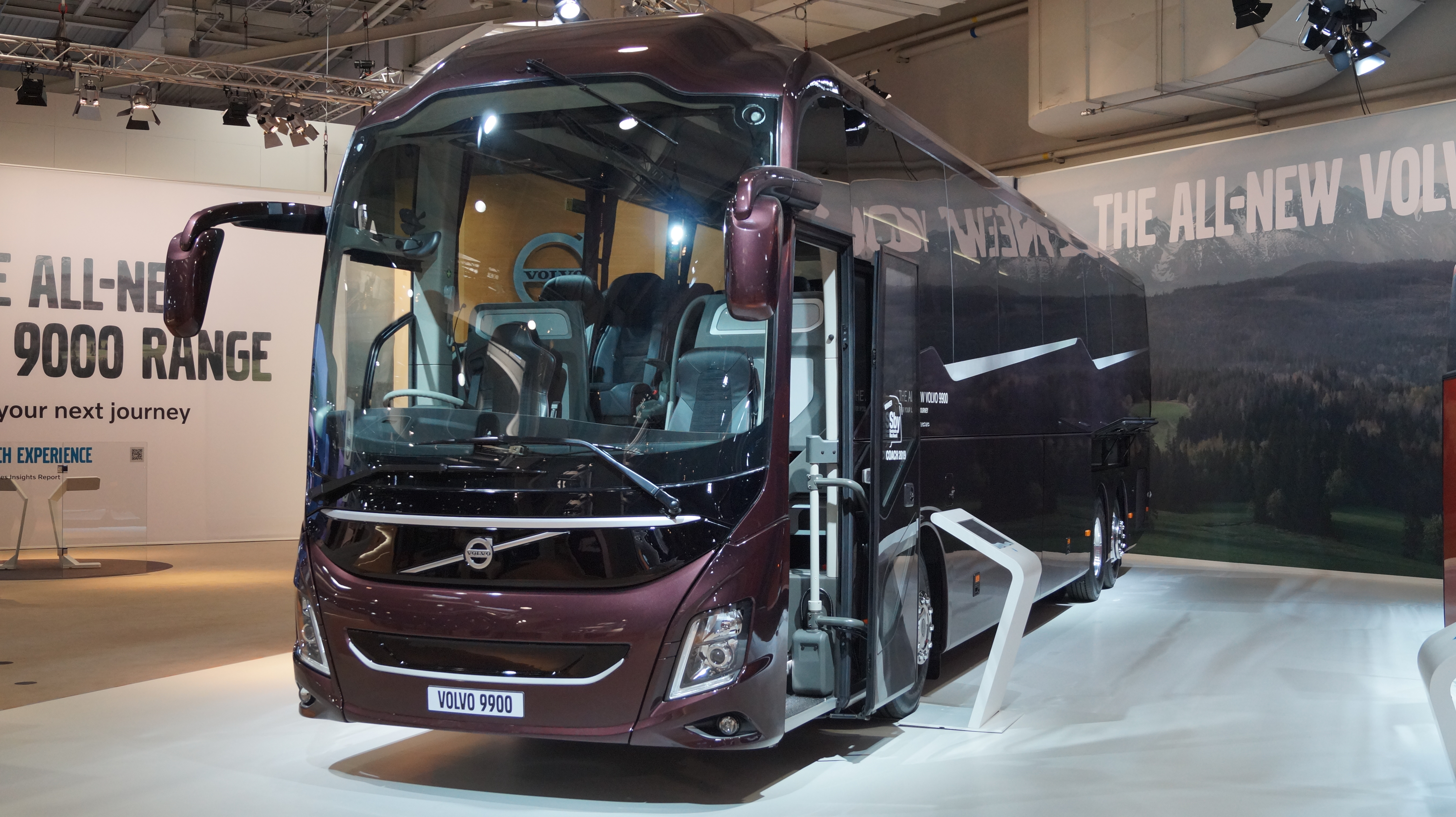 Schrägansicht der Front eines Volvo 9900 6x2, ausgestellt auf der IAA 2018.